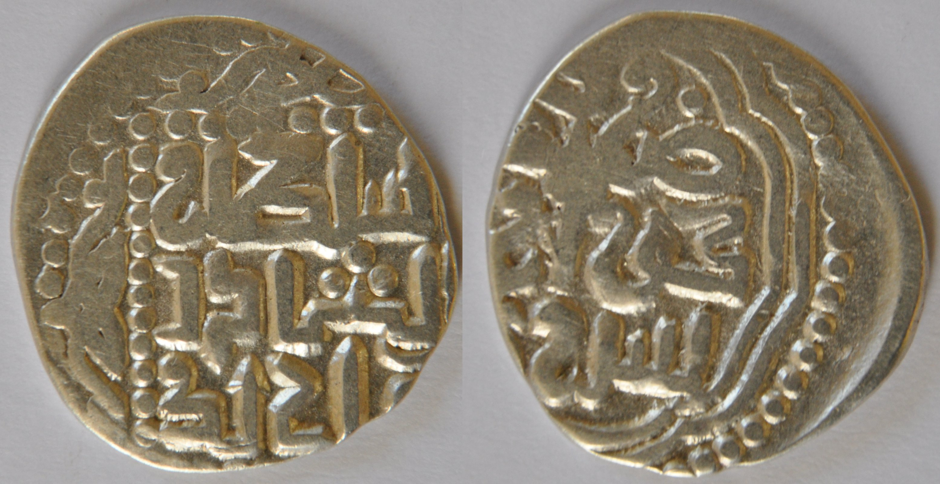 Un dirham ou un dang en argent de Jani Beg Khan (AH 742-758 / 1342-1357 AD) de la Horde d'Or (Juchides) émise à New Sarai en AH 747. Dimension : 17.47 mm Poids : 1.9 g. Référence : Album-2027